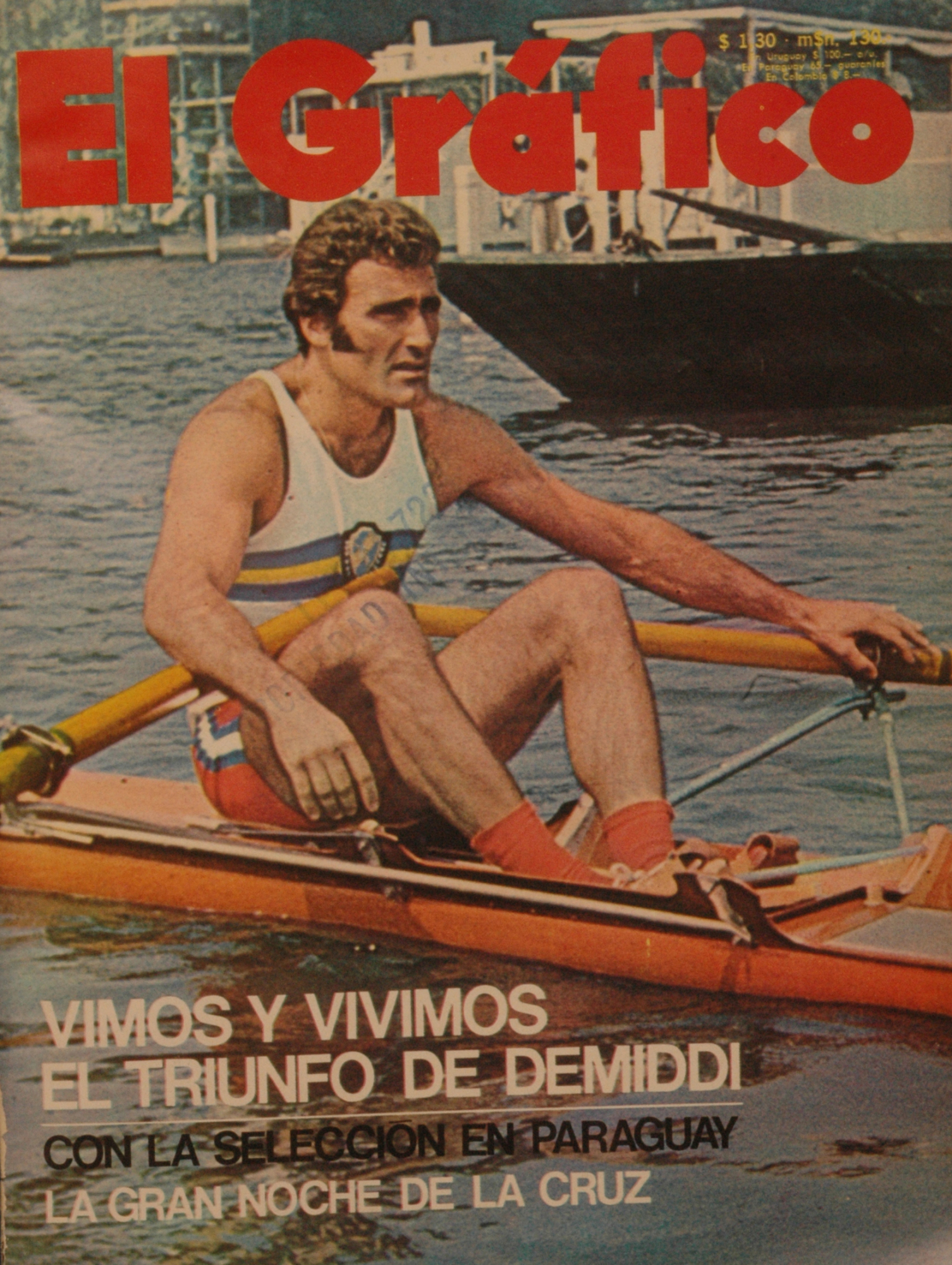 El Grafico del 06 de Julio de 1971. Edicion 2700